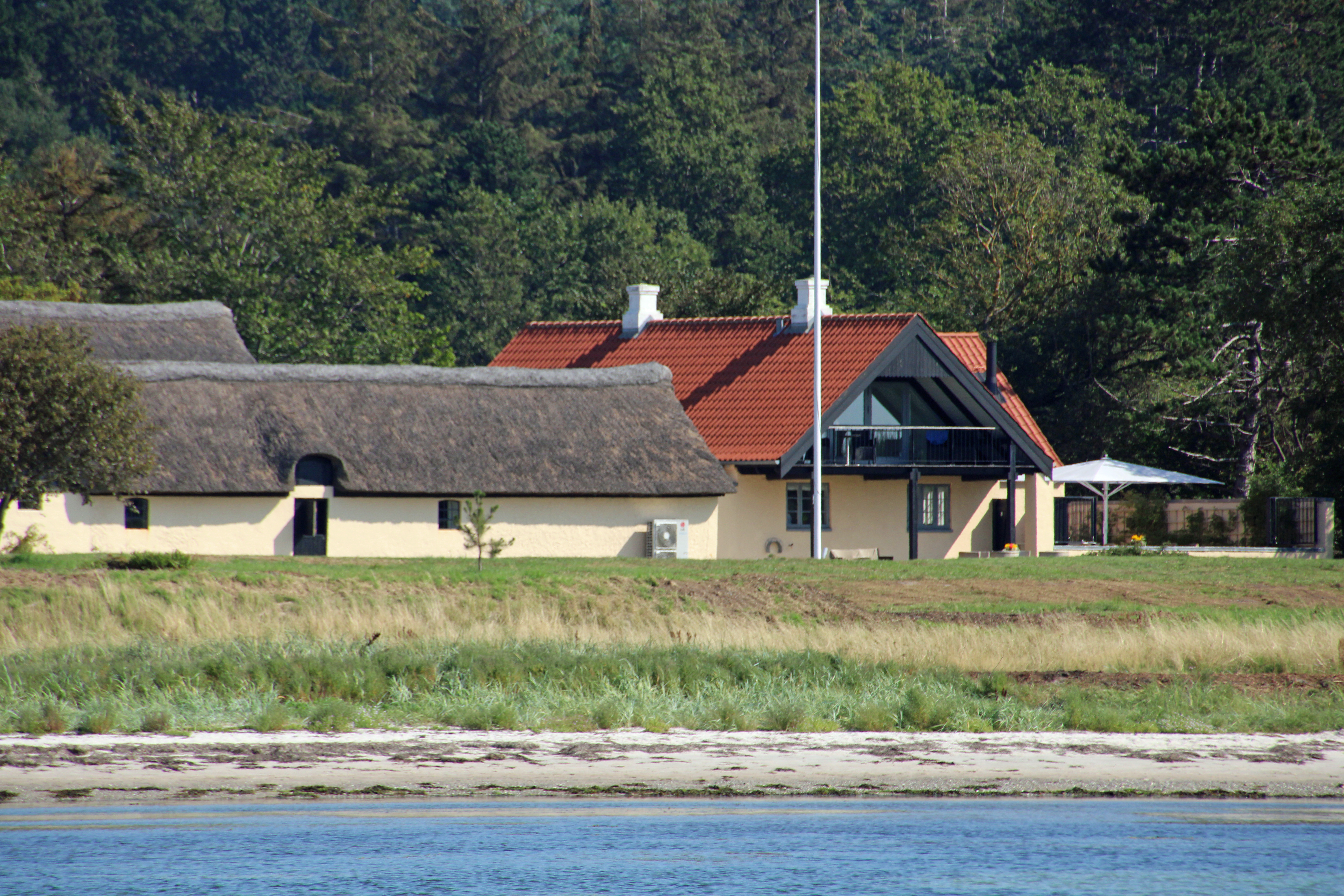 Nøset set fra Vigen